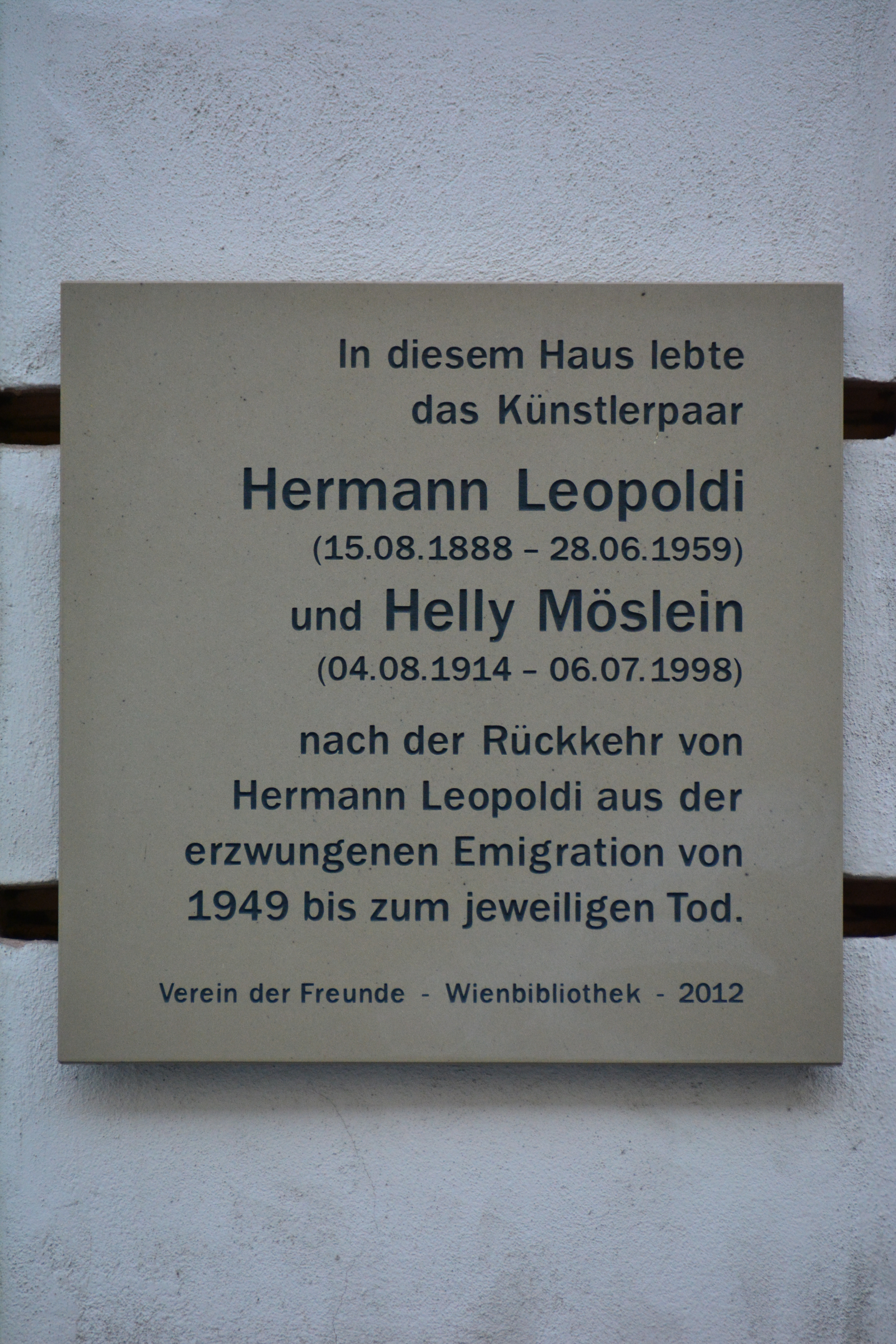 Gedenktafel für Hermann Leopoldi und Helly Möslein (Wien, Diesterweggasse 8)